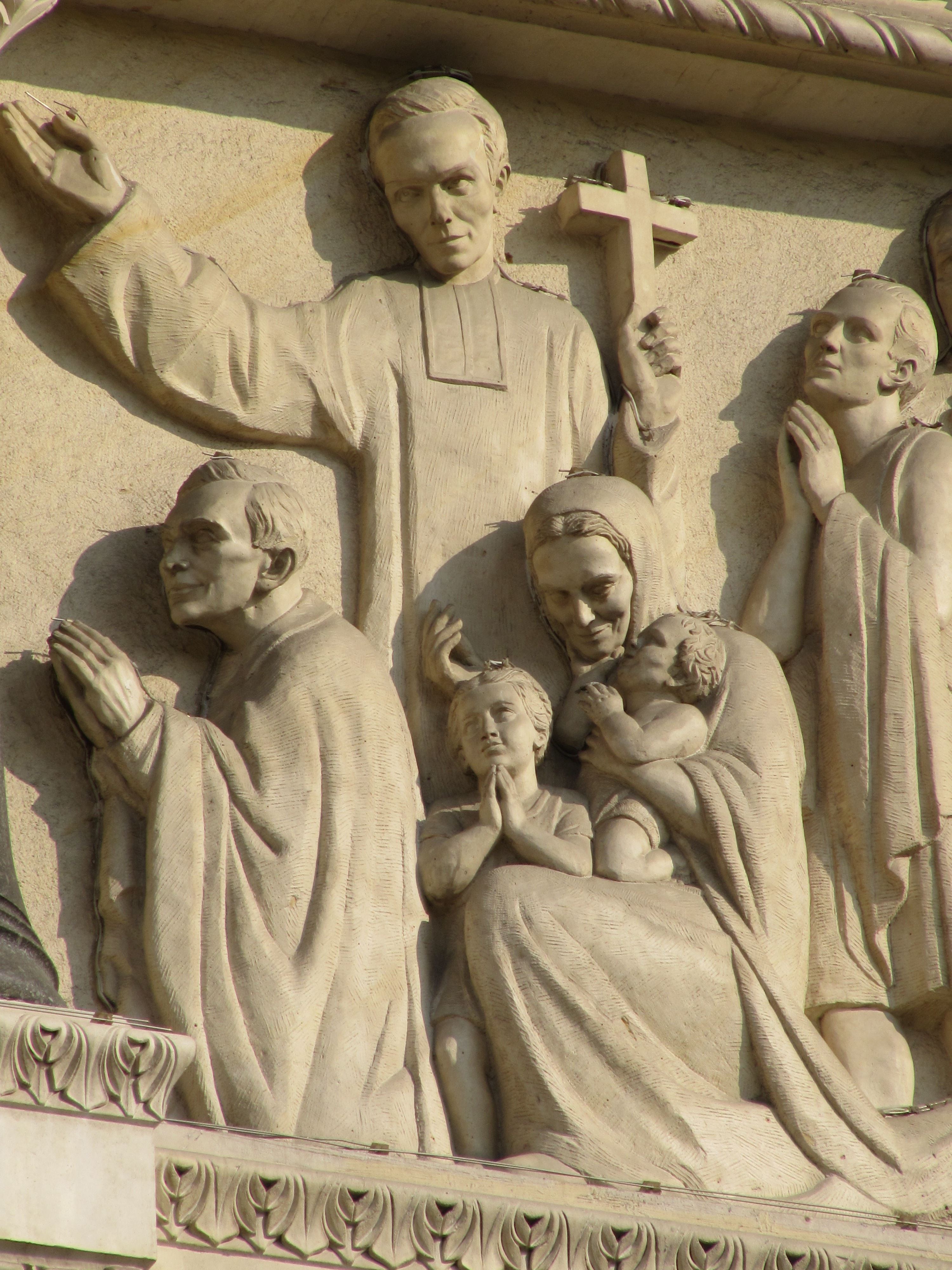 Блаженный Антуан Шевриер, барельеф, Базилика Нотр-Дам-де-Фурвьер, Лион, Франция